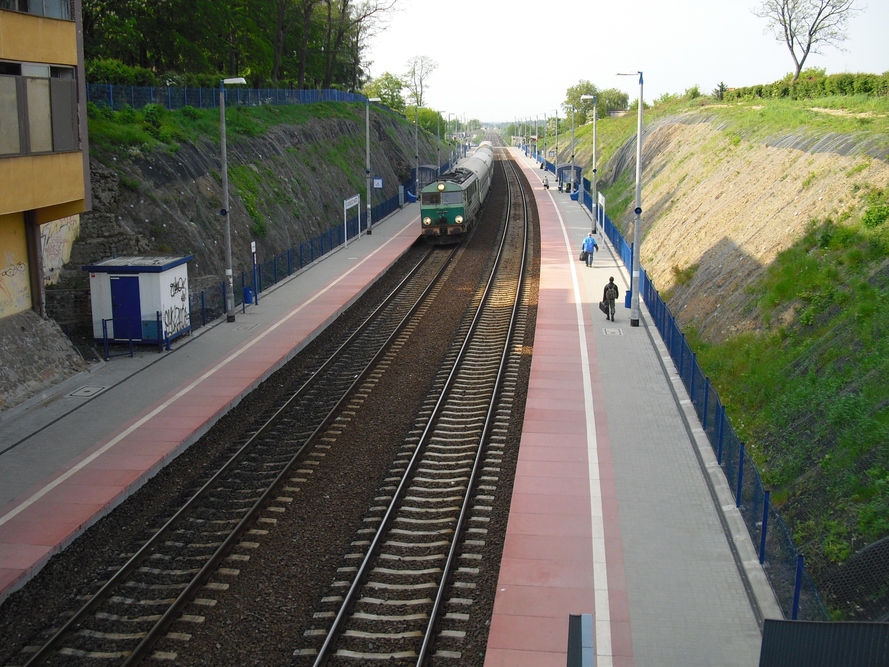 Stacja kolejowa Zgorzelec Miasto